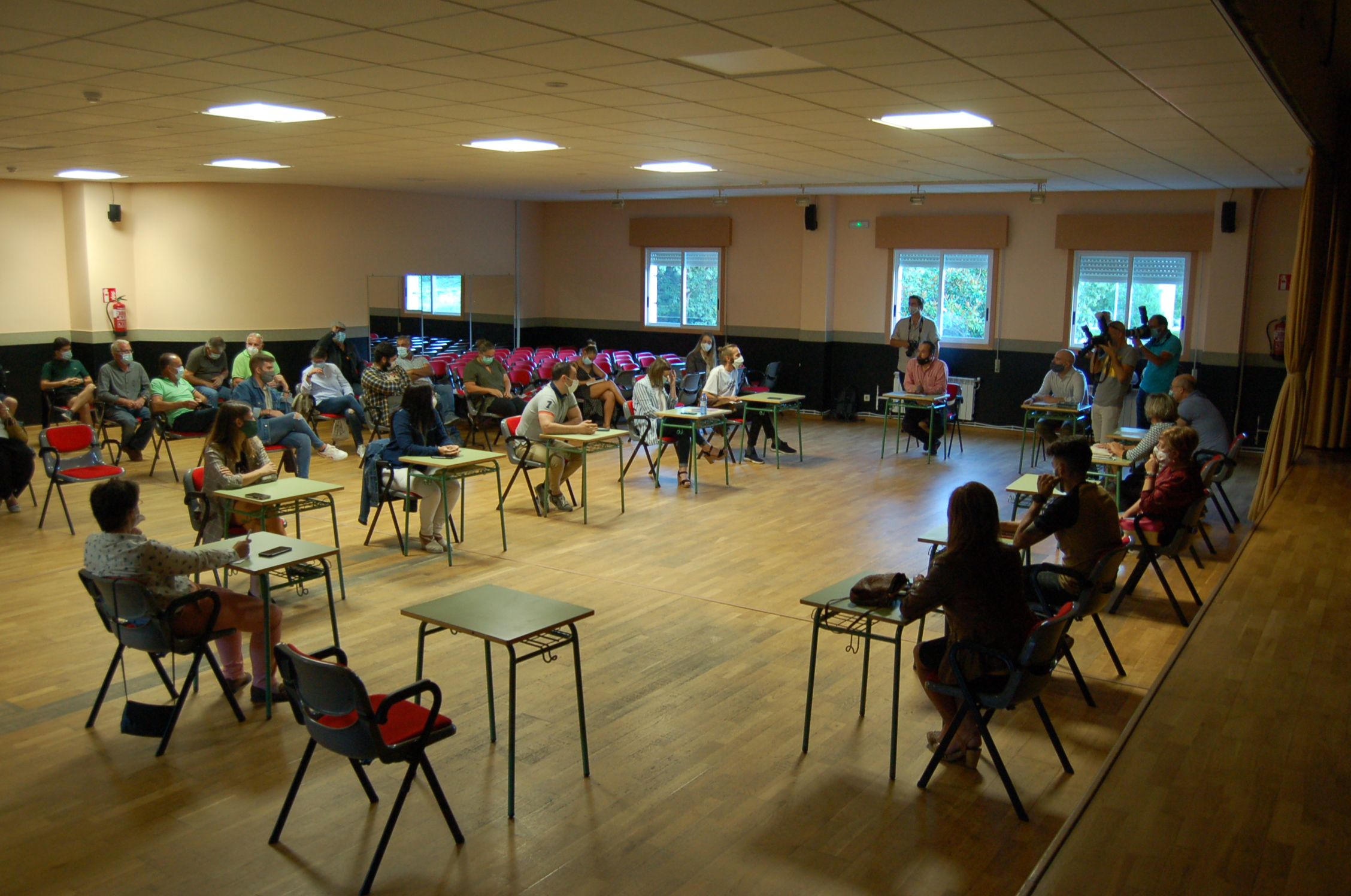 Pleno municipal do Concello de Vilaboa, na Casa da Cultura de Riomaior, durante a toma de posesión de César Poza como alcalde